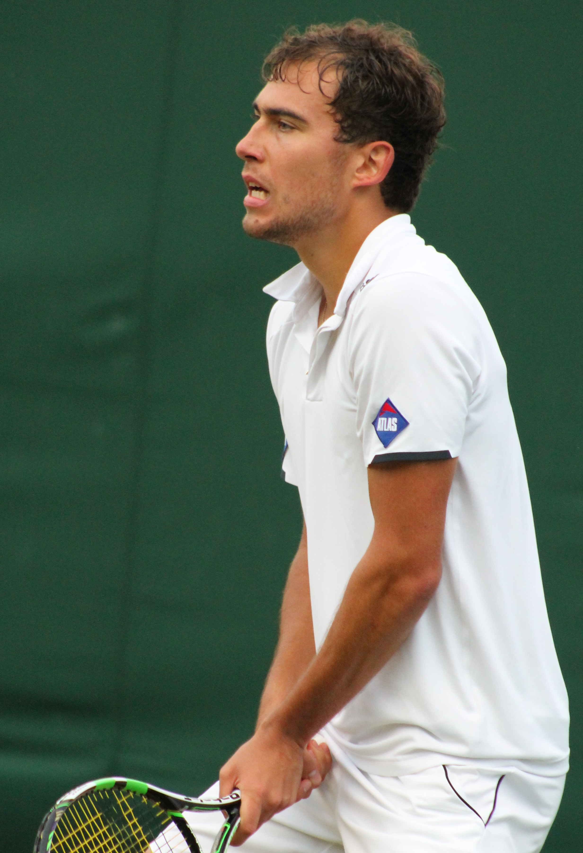 Janowicz WM14 (19)